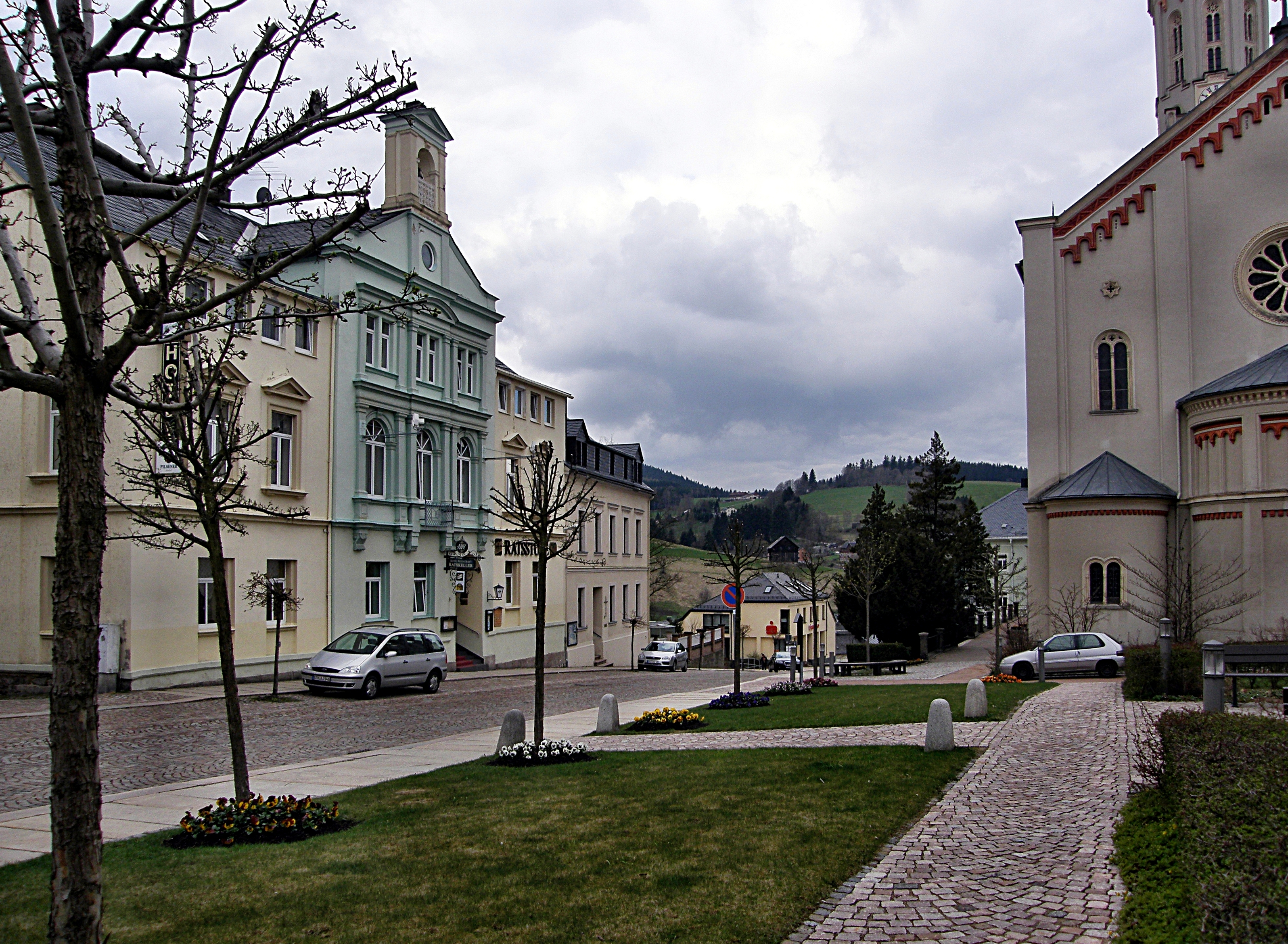 Eibenstock, Kirchplatz